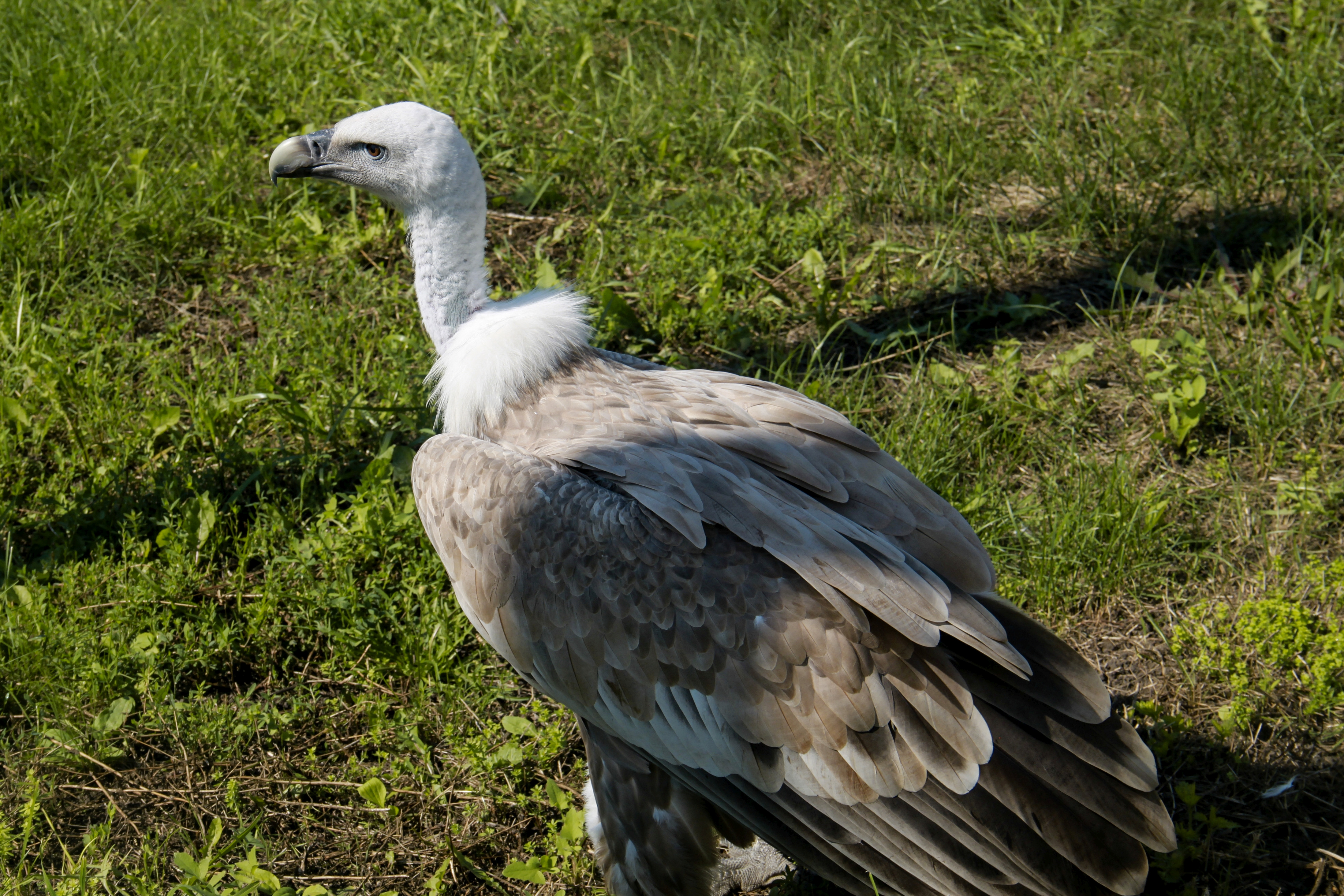 Белоголовый сип в Ряжском зоопарке (август 2019 года)